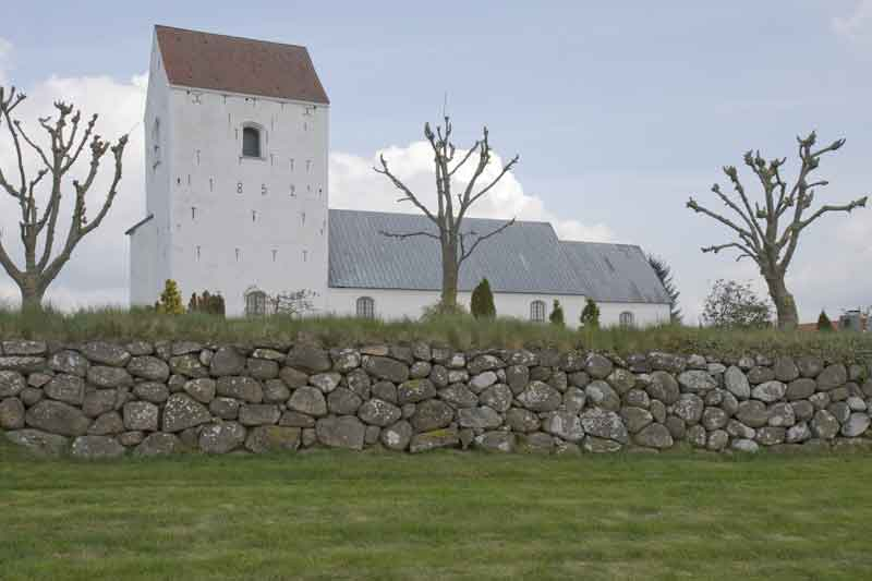 Torslev Kirke (Frederikshavn Kommune)